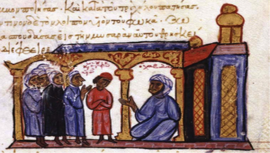 Auteur inconnu Miniature du XIIème siècle, Skyllitzes Matritensis, Bilioteca Nacional de Espana.